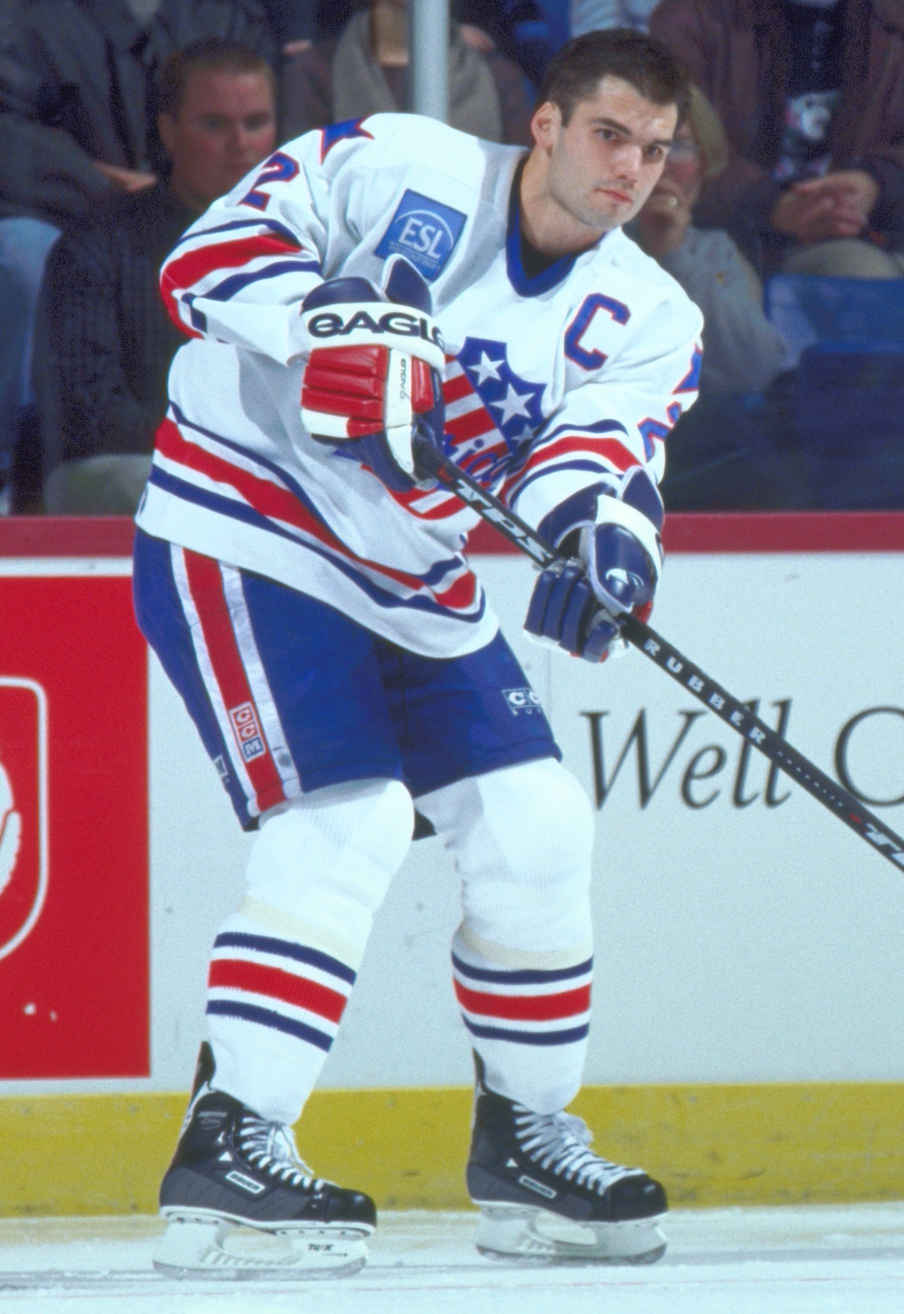 ahlstar0073